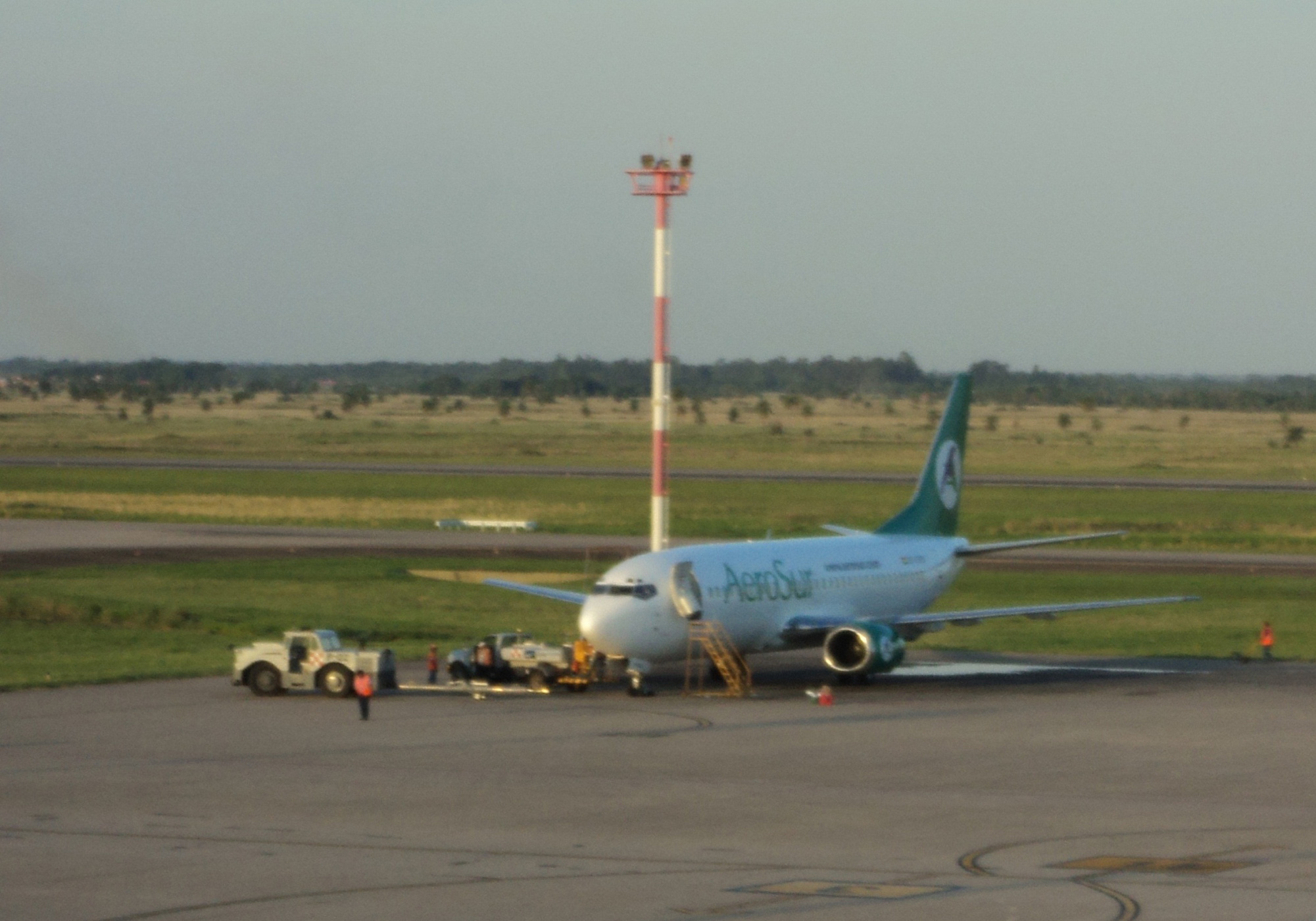 Boeing 737-300 de la desaparecida aerolínes boliviana Aerosur